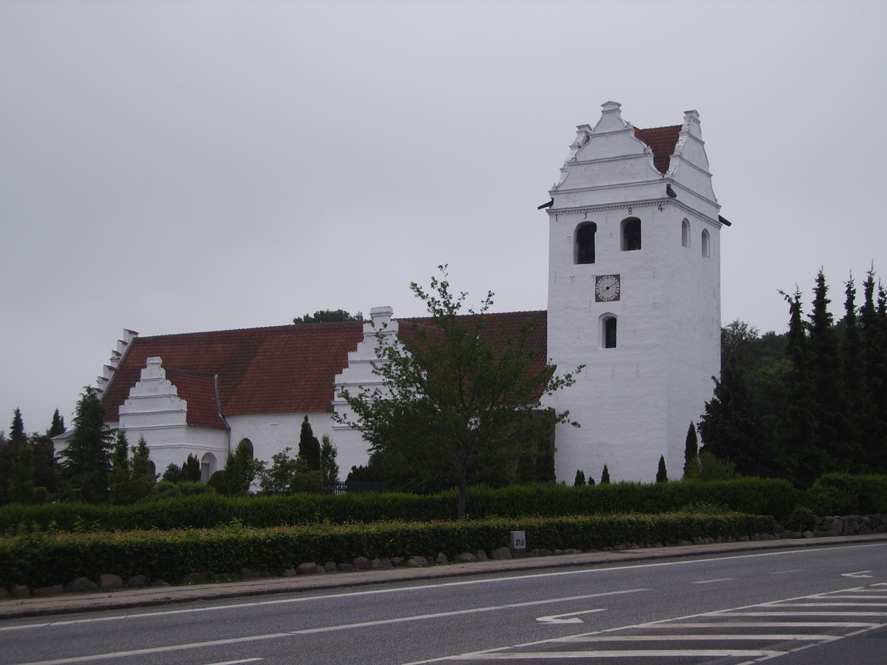 Nørre Lyndelse Kirke, Nørre Lyndelse Sogn, Åsum Herred, Odense Amt, Denmark (Danish Church) Date: 17.06.2006 Photographed by Søren Møller